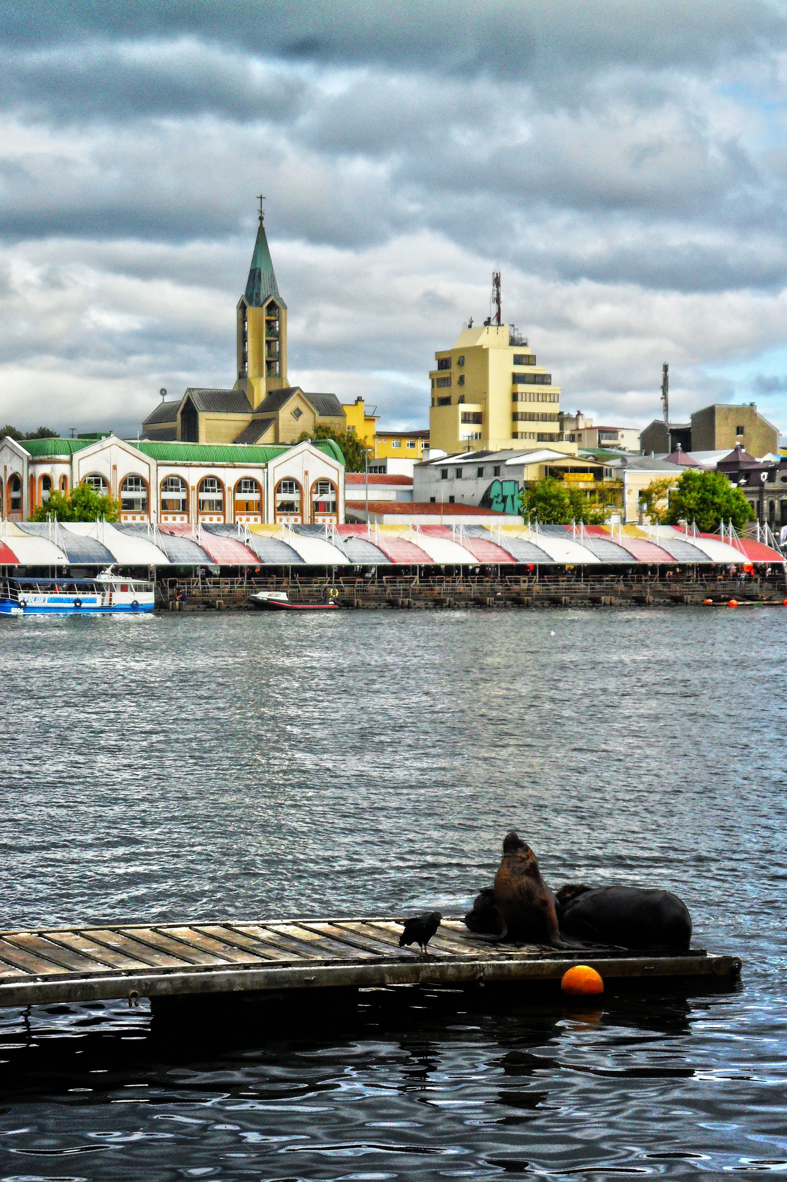 Fotografía tomada desde Isla Teja en febrero del año 2014. De fondo la feria fluvial de Valdivia, mercado y torre de iglesia